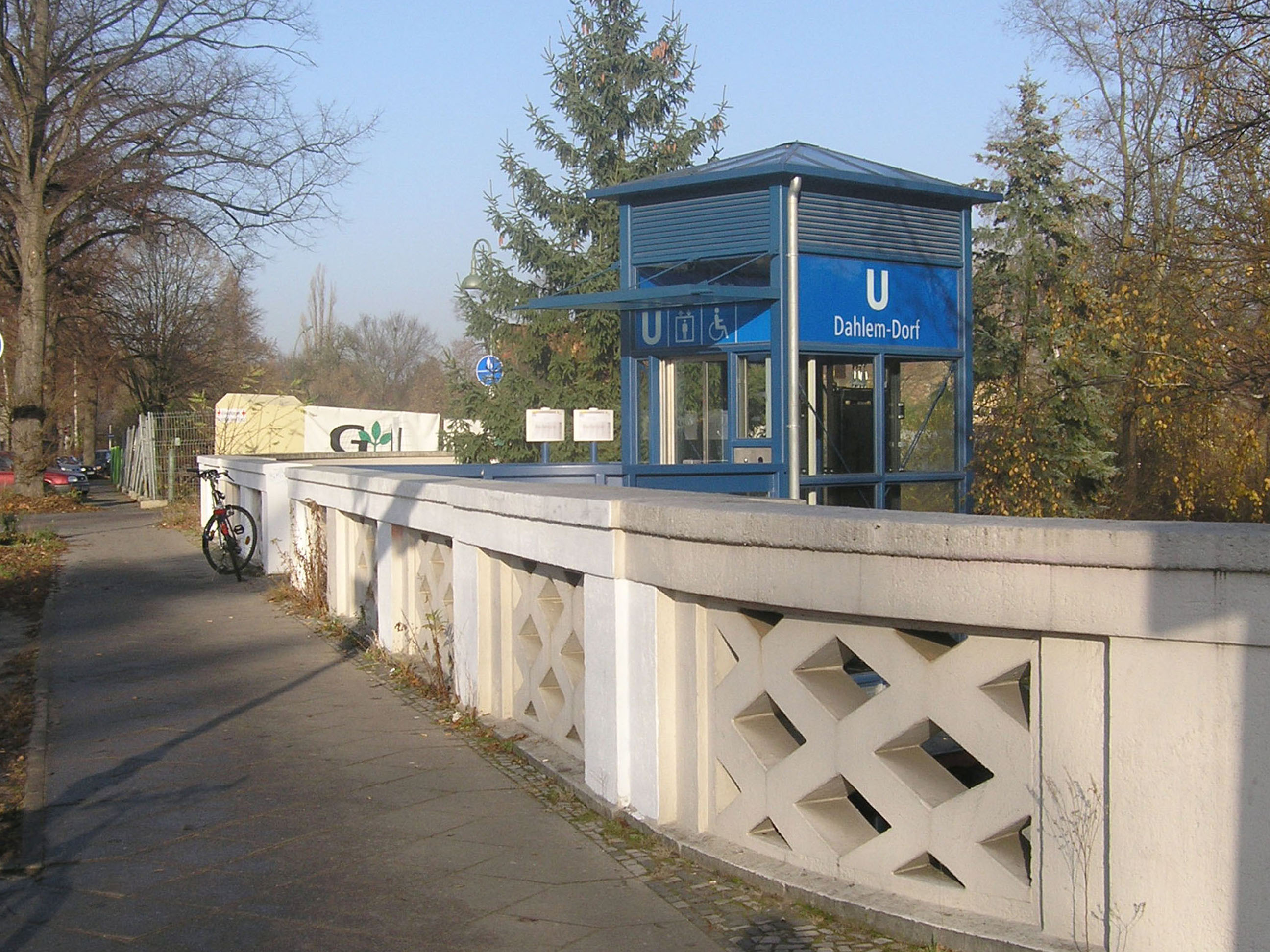 Zugang zum U-Bahnhof Dahlem-Dorf mittels eines Aufzuges